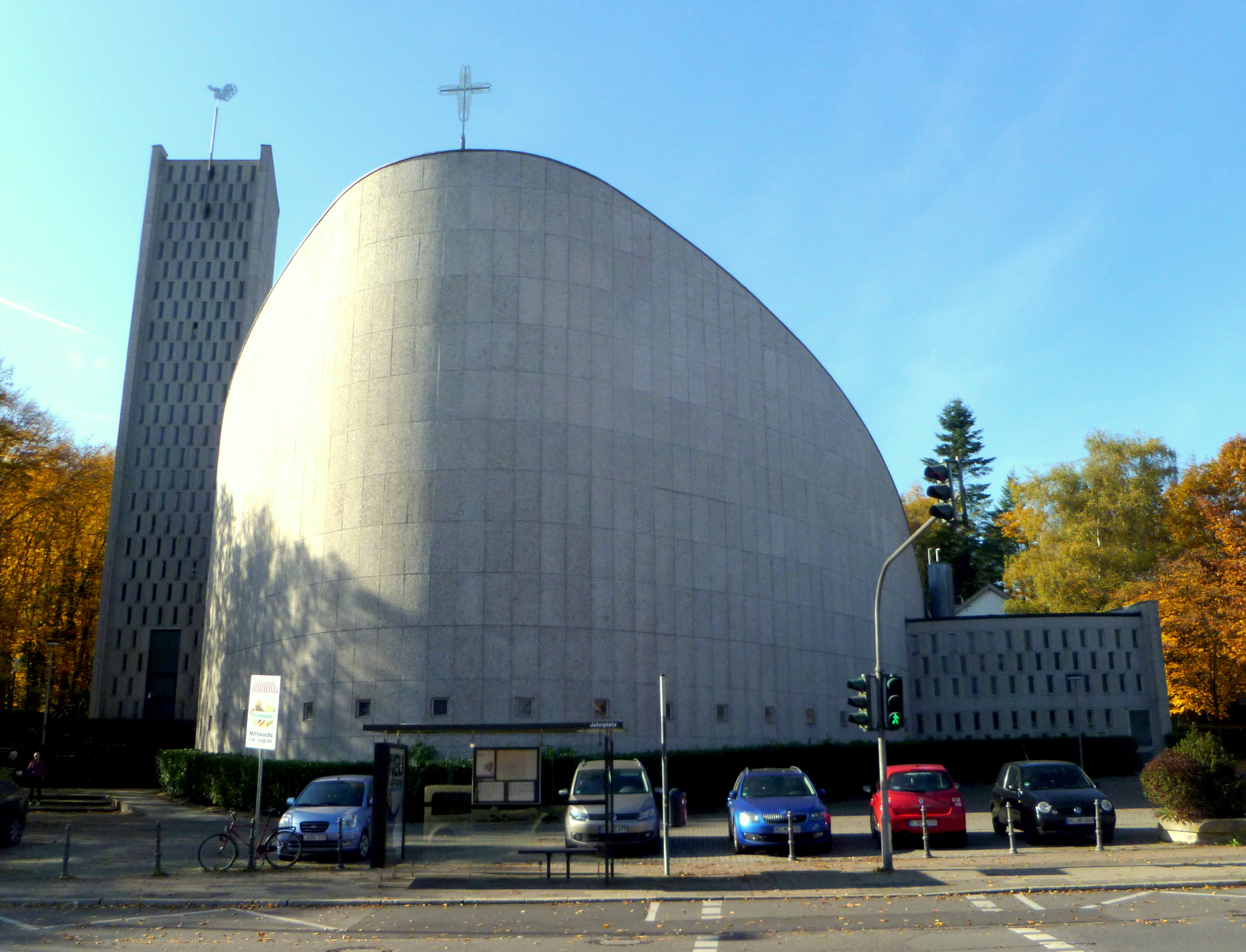 Ostansicht von St. Gregorius, Aachen-burtscheid